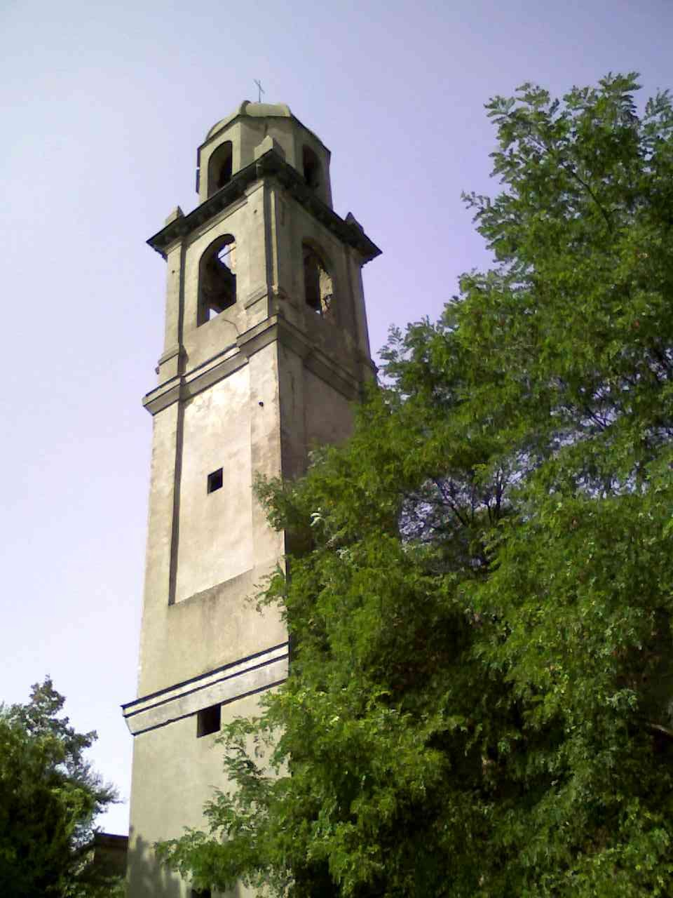 Campanile della ex chiesa parrocchiale di Stella San Giovanni, attualmente oratorio di San Sebastiano (Italy)